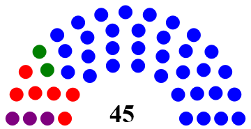 composicion de la Asamblea en ese periodo